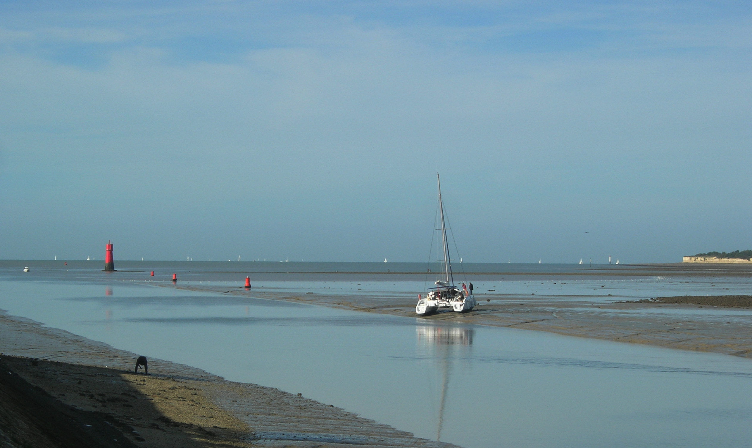 Description =Echouement le long du chenal d'accés du vieux port de La Rochelle Source =Photo taken by Remi Jouan Date =Octobre 2006 Author =Remi Jouan